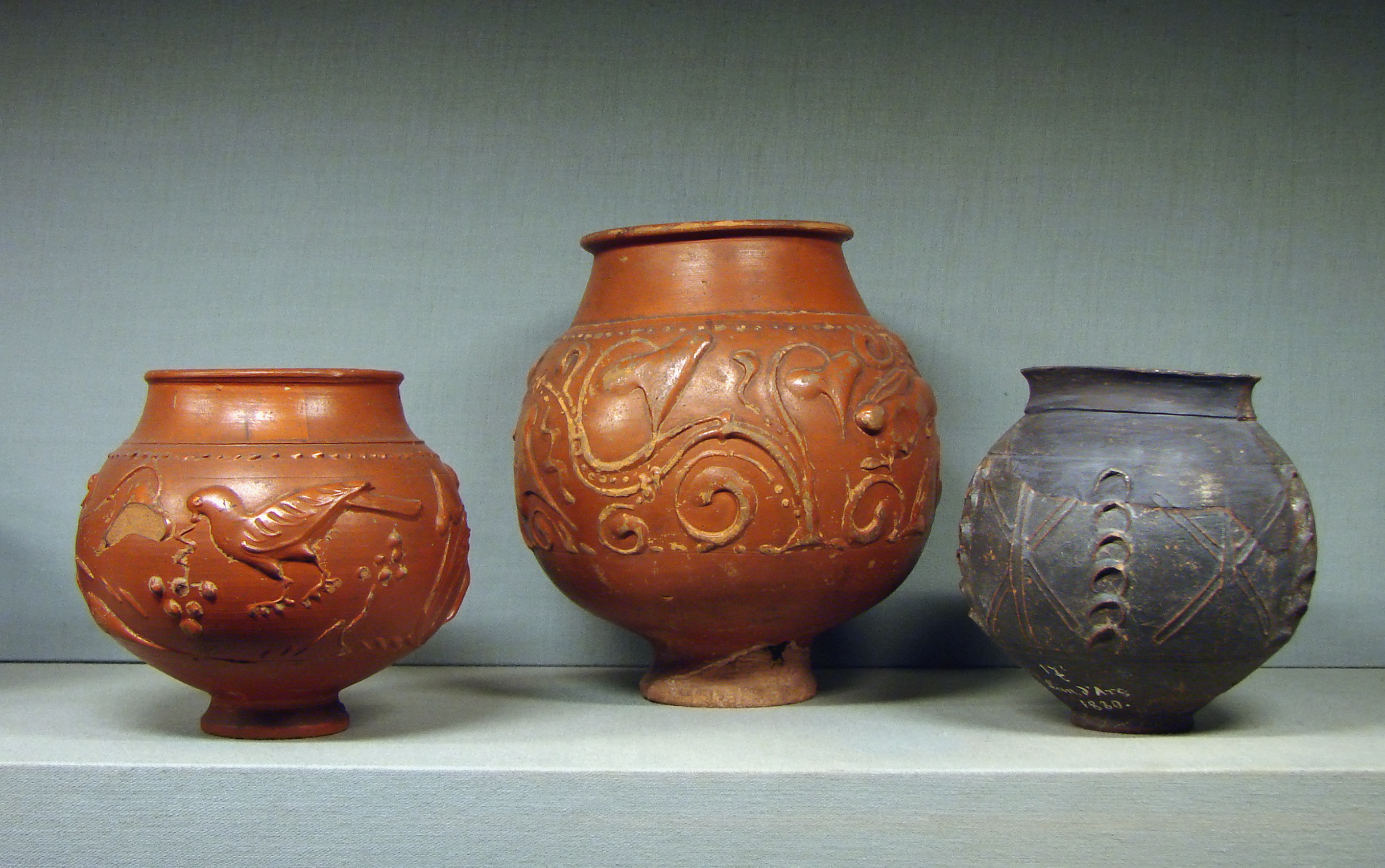 Céramique sigillée, époque gallo-romaine, musées de la Cour d'Or à Metz. A gauche, deux céramiques du type Drag. 54.